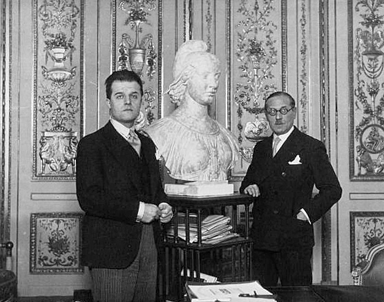 La nouvelle Marianne avec M. Mistler et le sculpteur [Pierre-Marie] Poisson [photographie de presse]